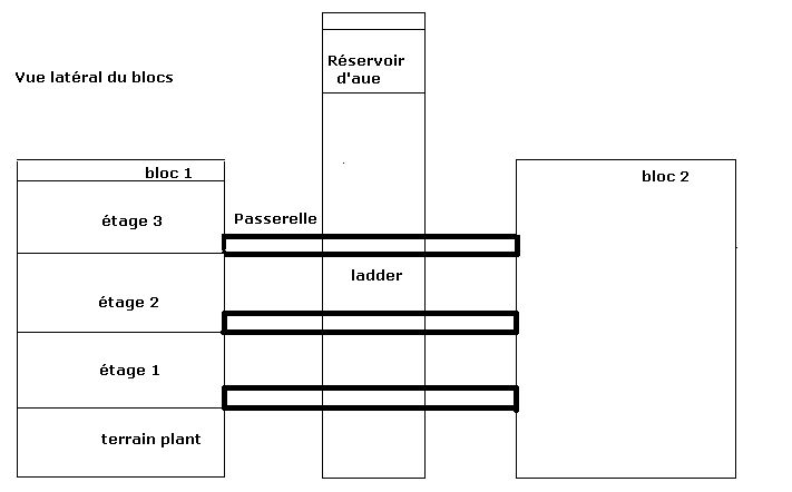 Estructura 2D con vista lateral de monoblocks, de cómo funciona el sistema de entrada a un departamento usando las escaleras.